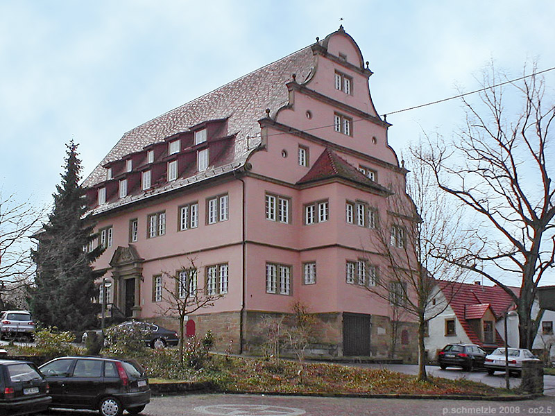 Schloss Zaberfeld, erbaut um 1600, mit Portal von 1712